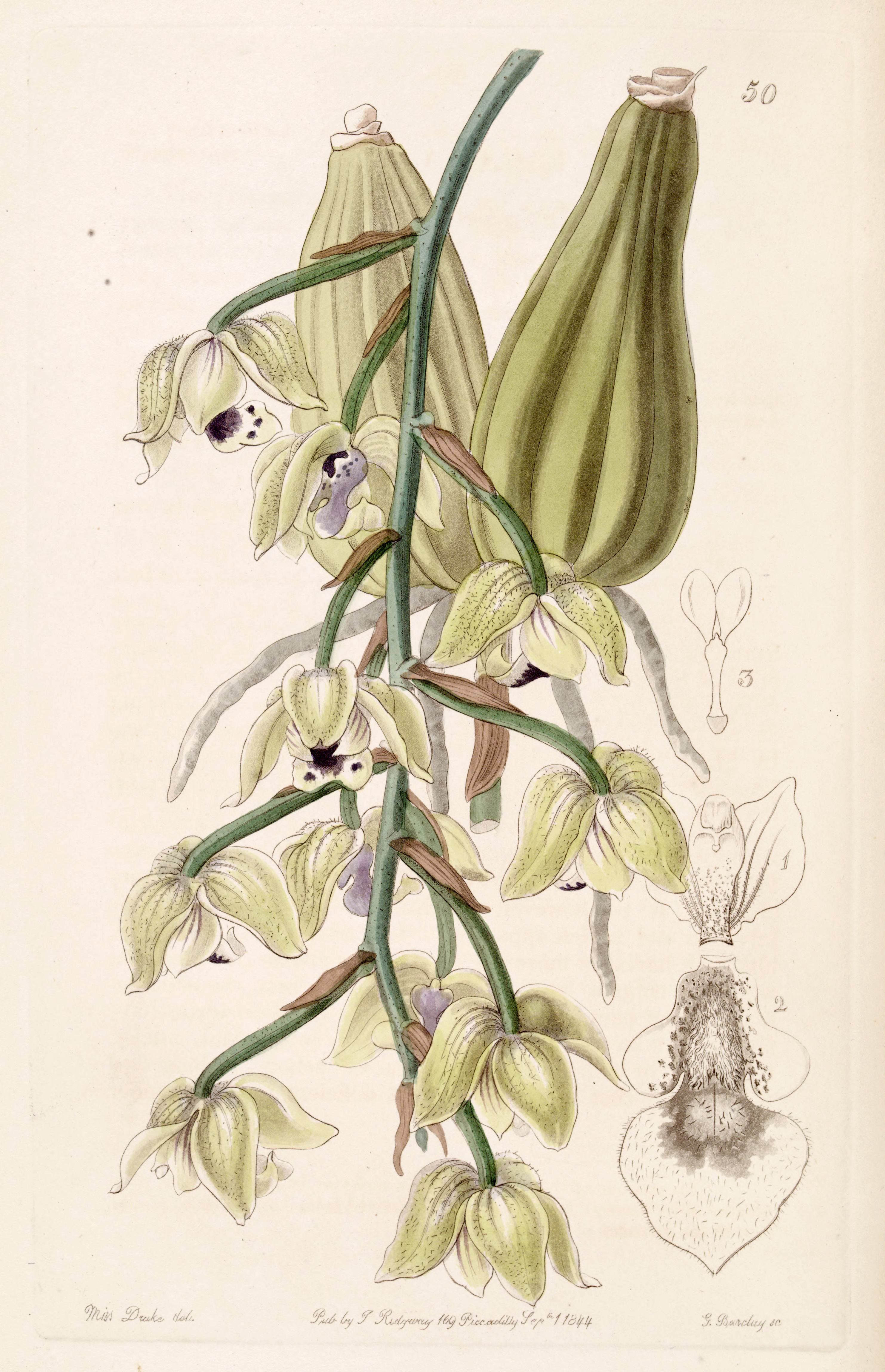 Lacaena bicolor